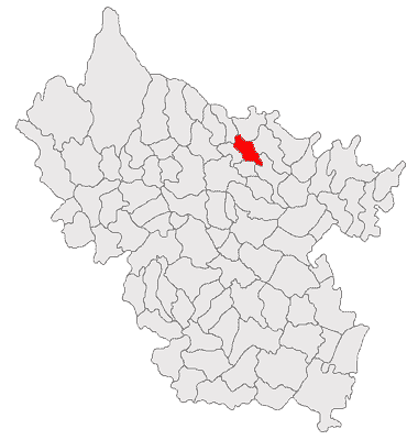 Categorie:Hărţi ale judeţului Buzău